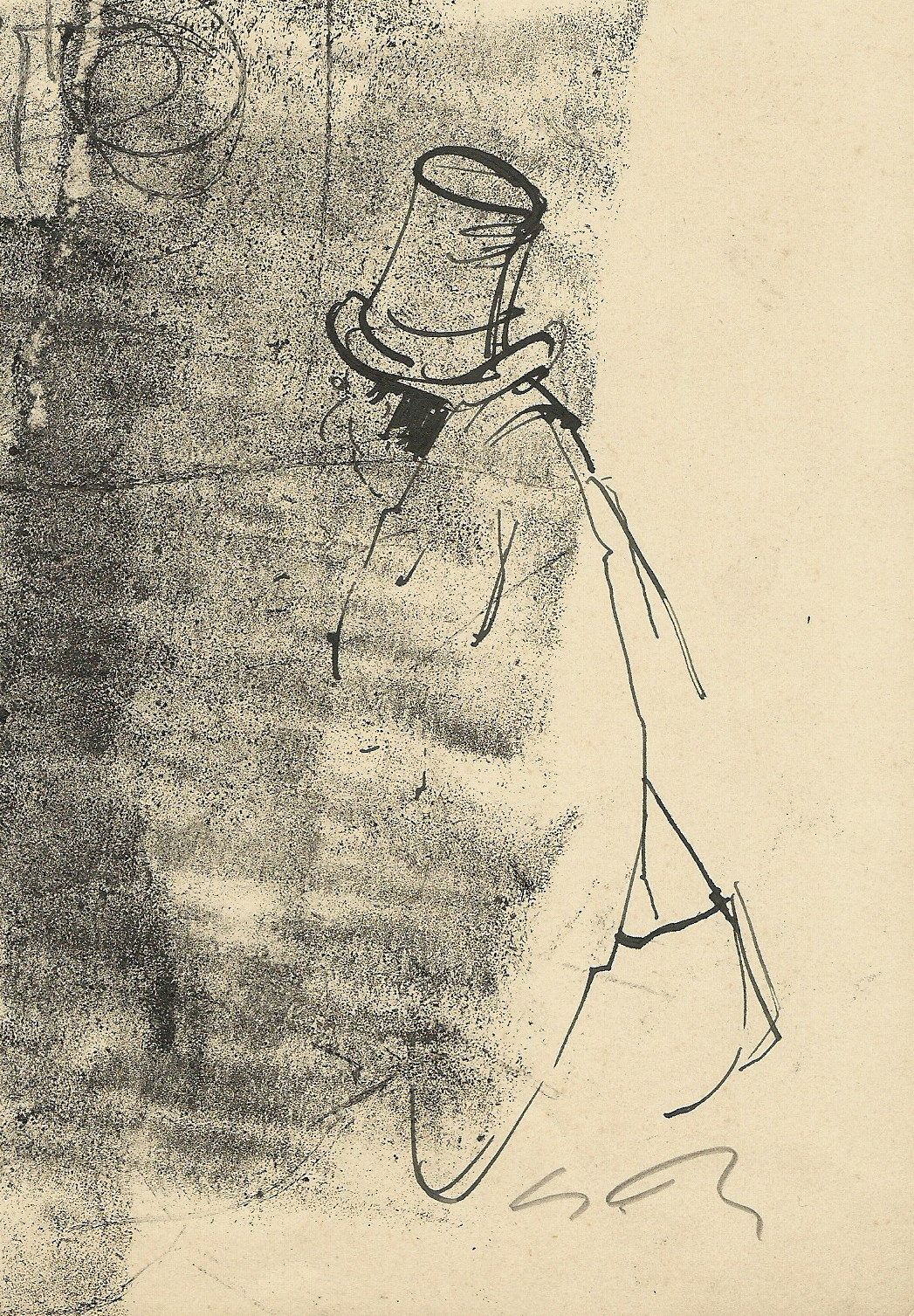 Werner Baumann, "Der Blick ins Dunkle", Tuschfederzeichnung, 1948, 21cm x 14cm